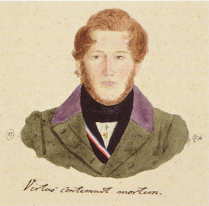 Aquarellporträt von Louis Sauerhering (1814-1889) als Student in Königsberg und Mitglied des Corps Masovia